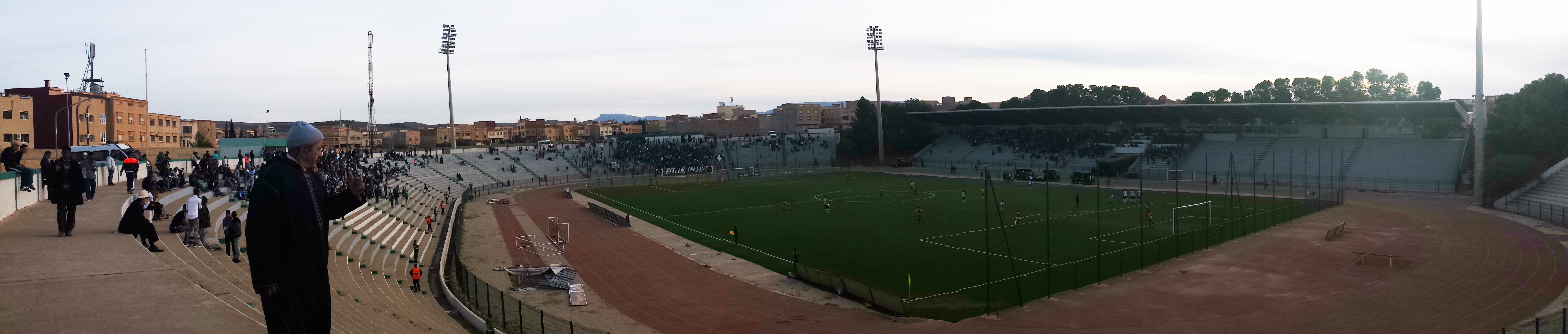 Vue panoramique du stade